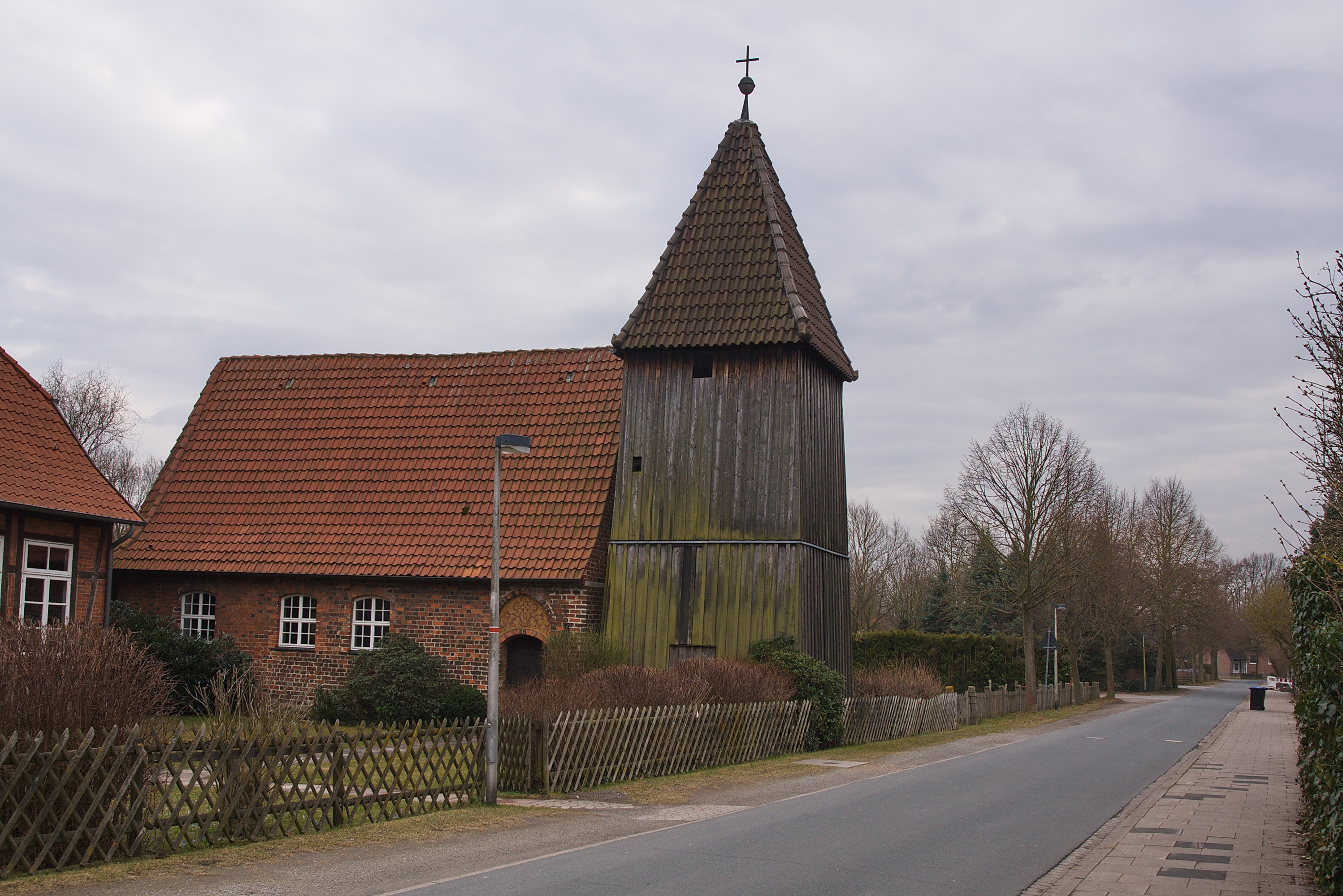 Kapelle von 1350 in Otze (Burgdorf), Niedersachsen, Deutschland.